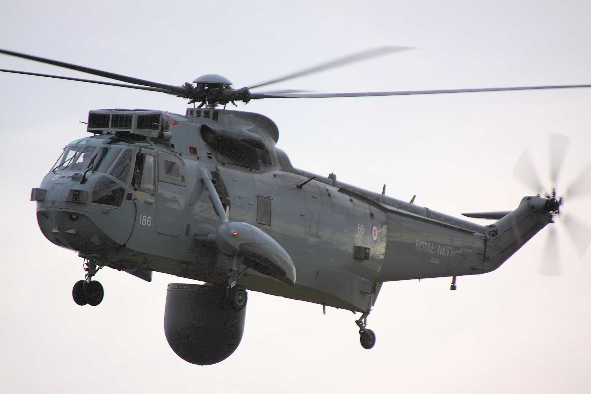 Sea King - RIAT 2009